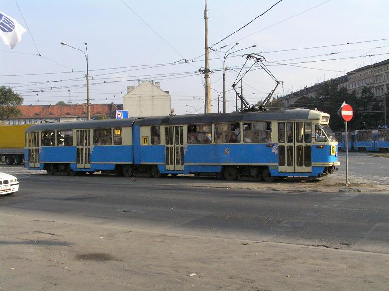 102Na tram in Wrocław